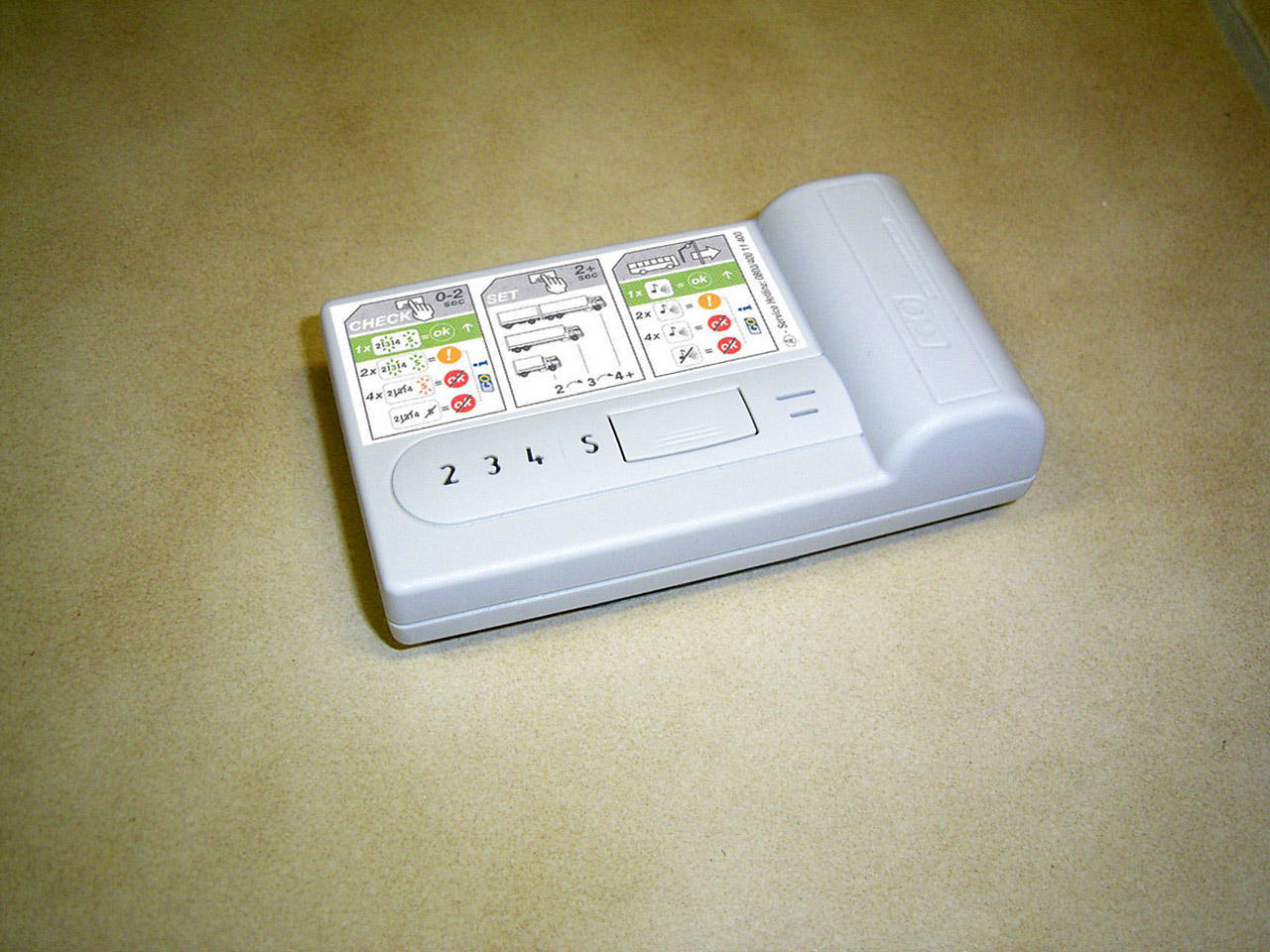 österr. GO-Box